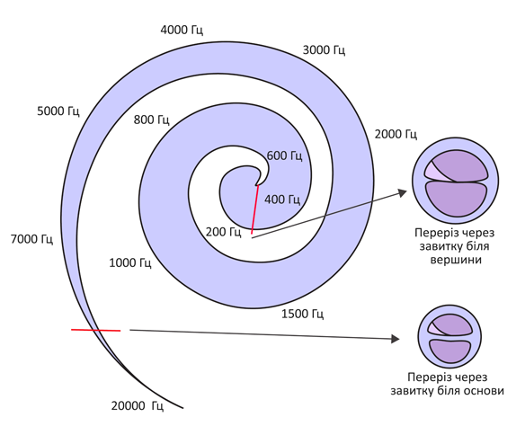 Карта ділянок завитки, що сприймають звуки різної частоти. Схематичне зображення завитки внутрішнього вуха, на якому відображено ділянки, що сприймають звуки різної частоти, а також різниця у будові базилярної мембрани при основі та на верхівці завитки.